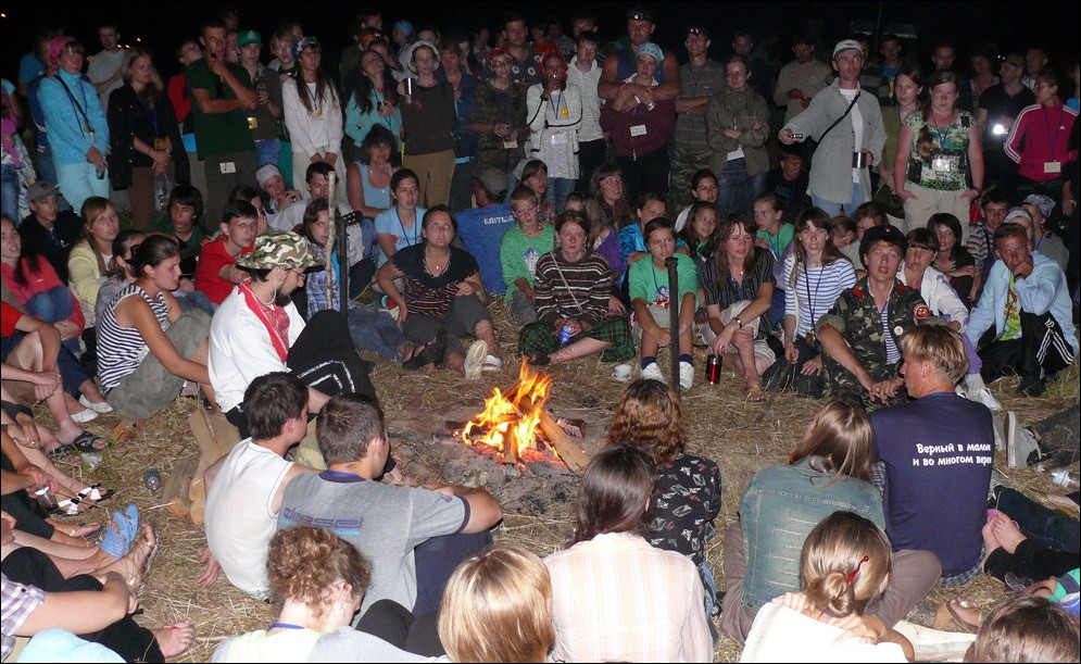 Братья-2010. Вечер у костра